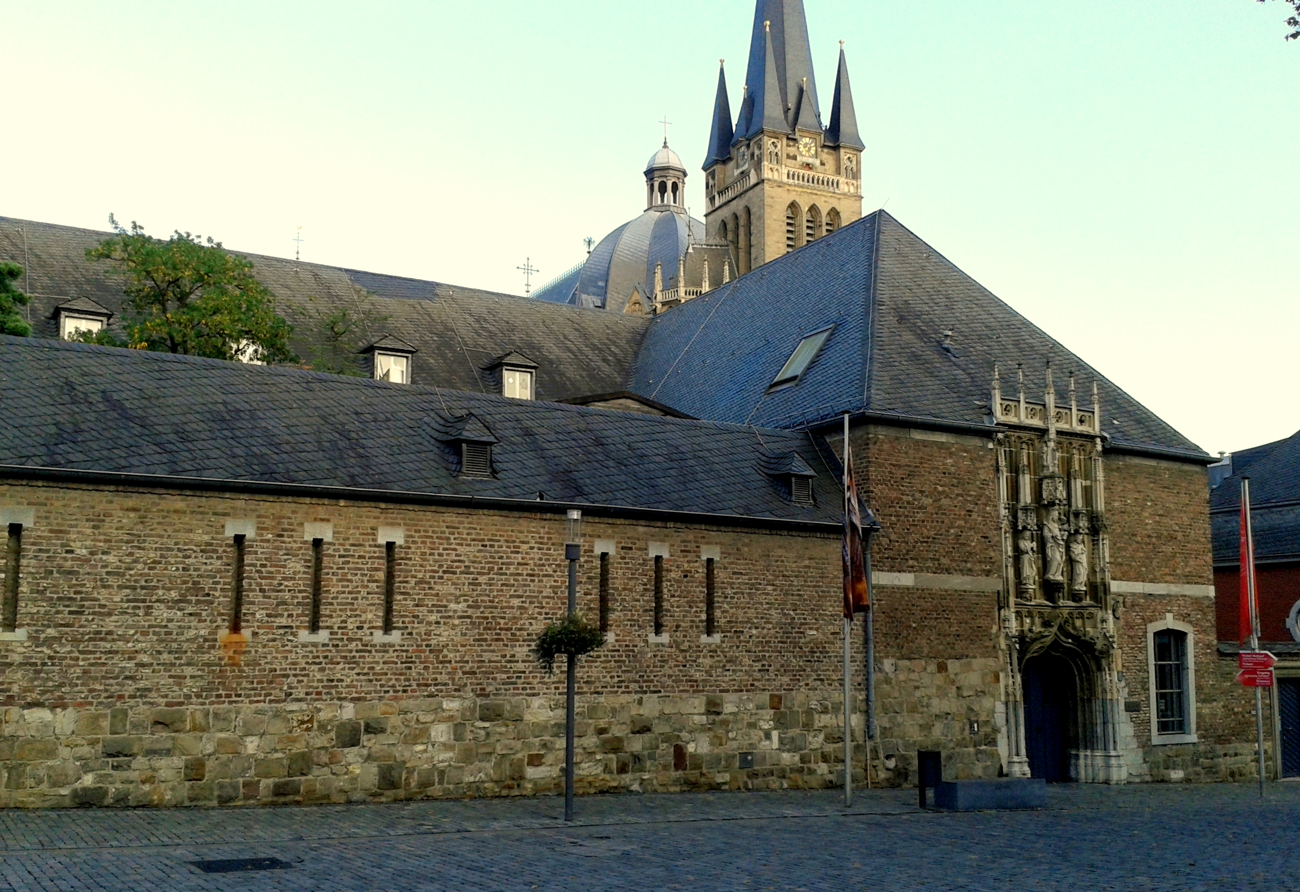 Domschatzkammer Aachen, Gesamtansicht